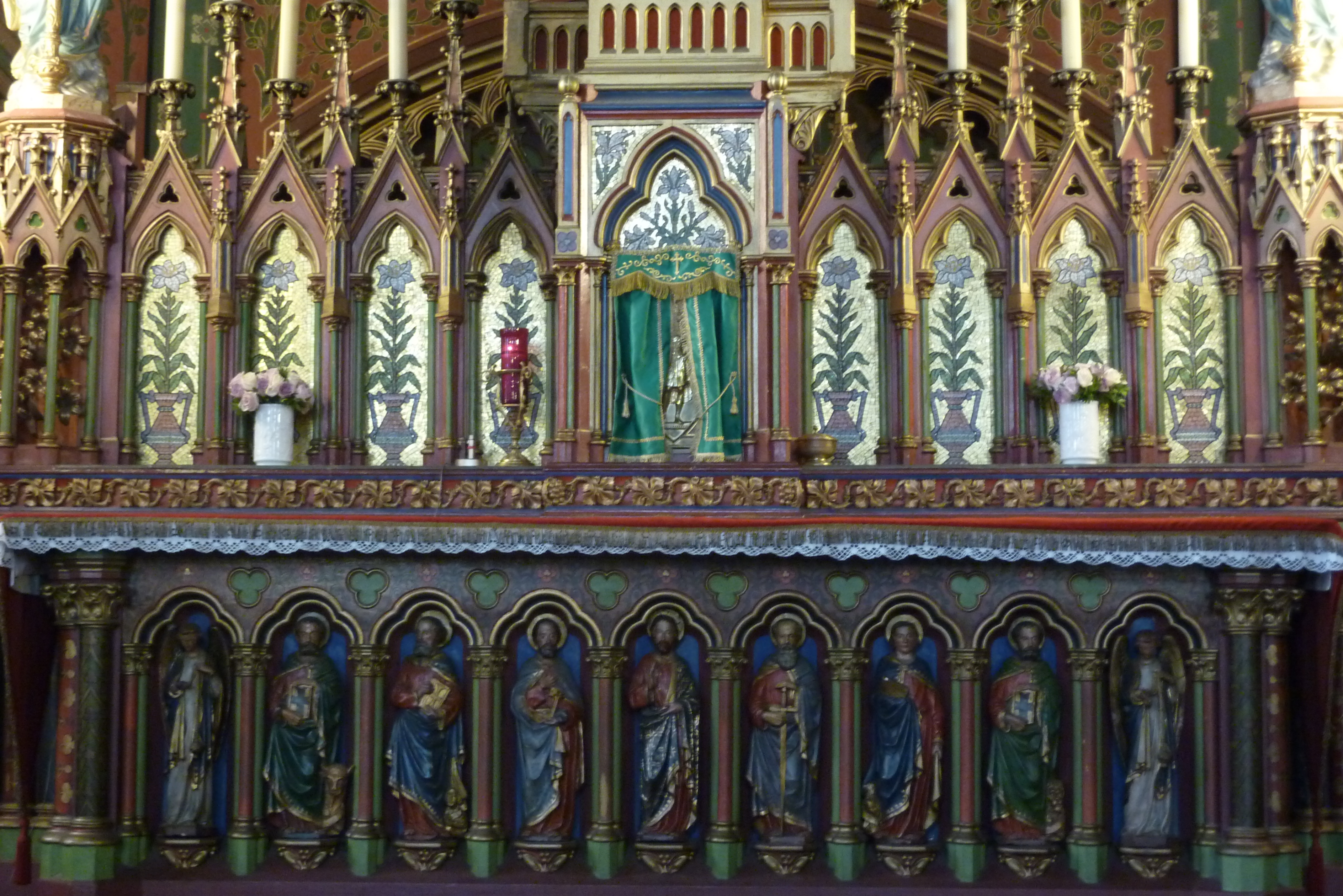 Katholische Pfarrkirche St-Eugène-Ste-Cécile im 9. Arrondissement von Paris, Altar mit Heiligenfiguren